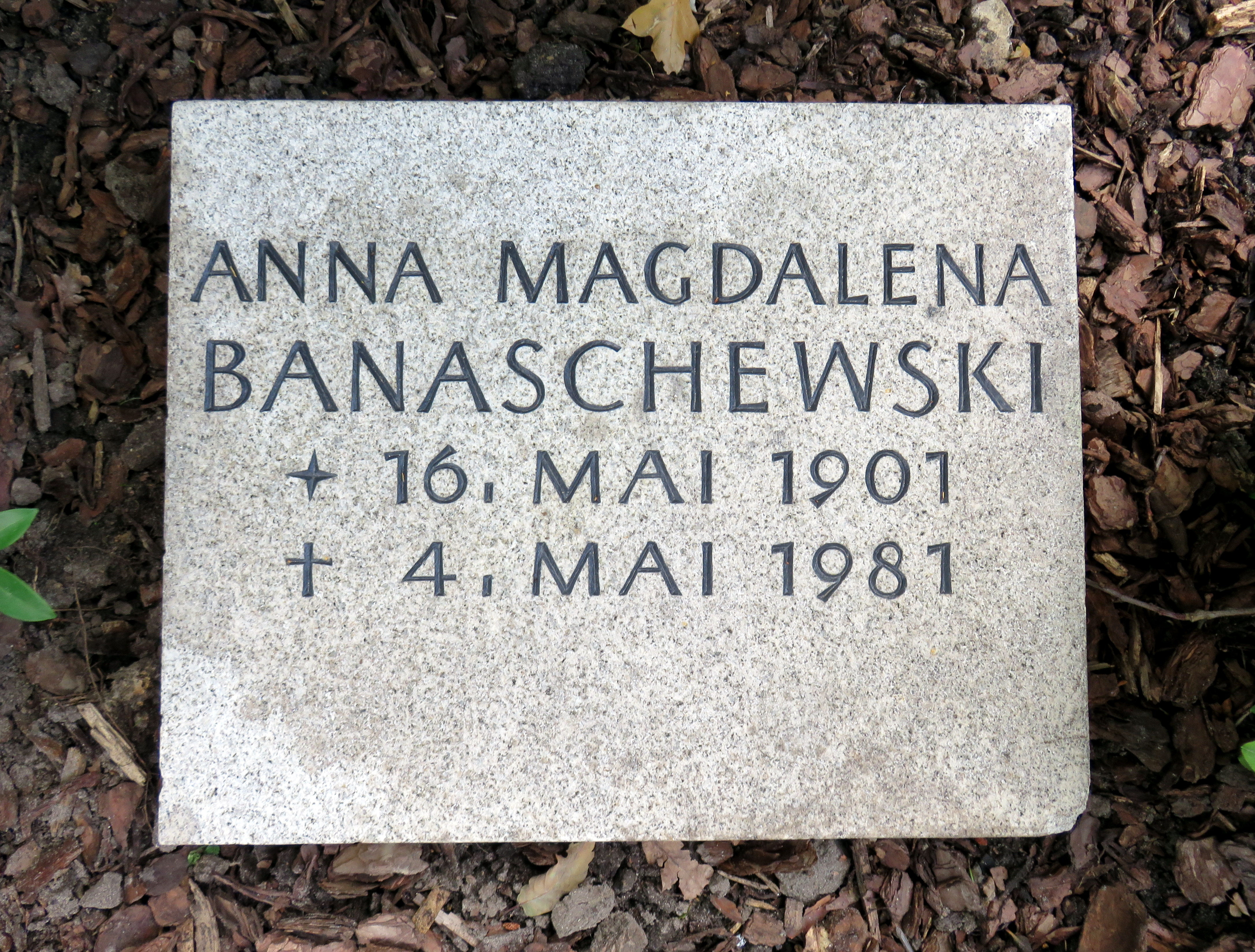 Historischer Kissenstein der deutschen Reformpädagogin Anne Banaschewski im Bereich des Gartens der Frauen auf dem Ohlsdorfer Friedhof in Hamburg-Ohlsdorf.